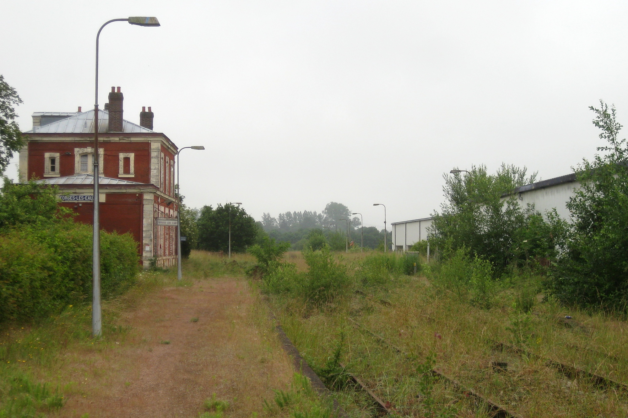 L'état d'abandon des voies de la gare de Forges-les-Eaux